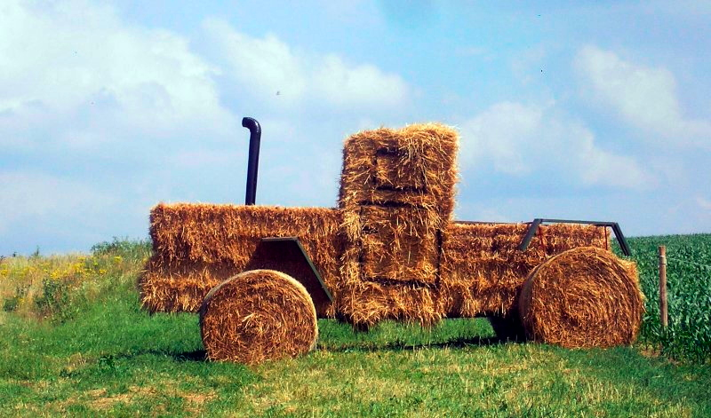 Strohballennachbau eines MB trac für das 1. MB-Trac- und Unimog-Treffen in Schönberg am 3./4.7.2010; Landkreis Bernkastel-Wittlich, Deutschland